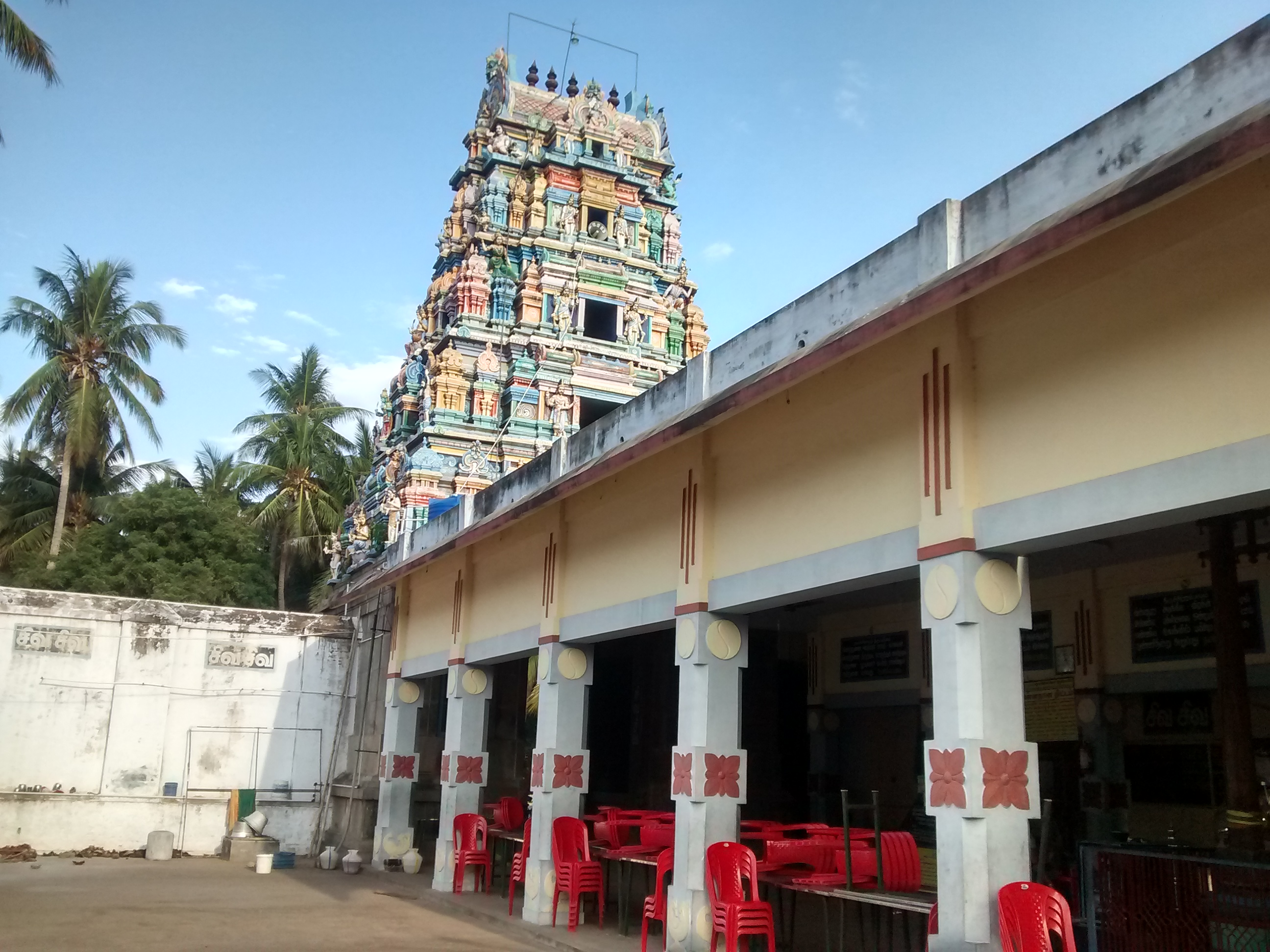 பேட்டவாய்த்தலை மத்யார்ஜுனேஸ்வரர் கோயில்